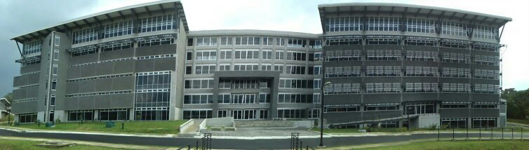 Facultad de Ciencias Sociales